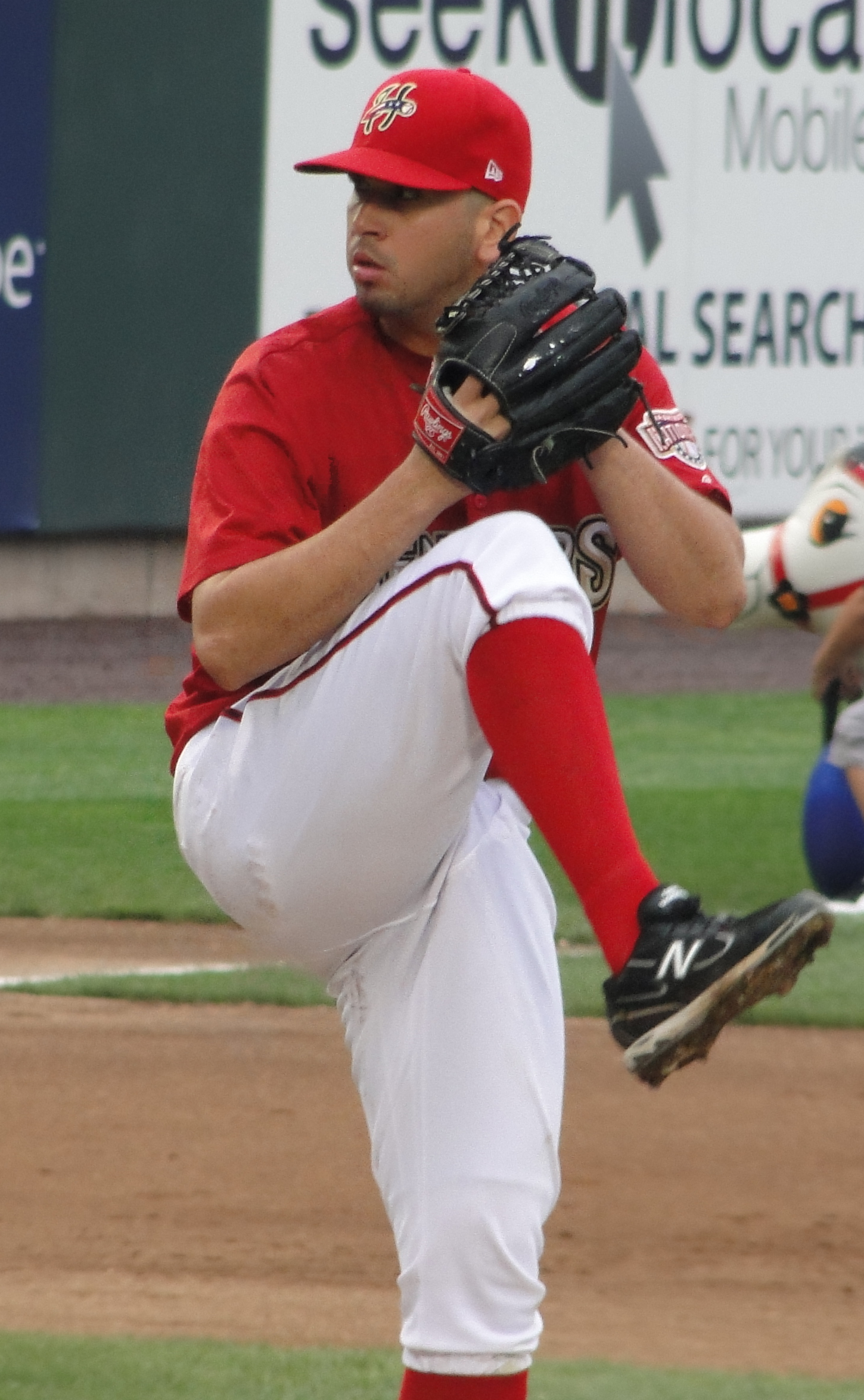 Óliver Pérez